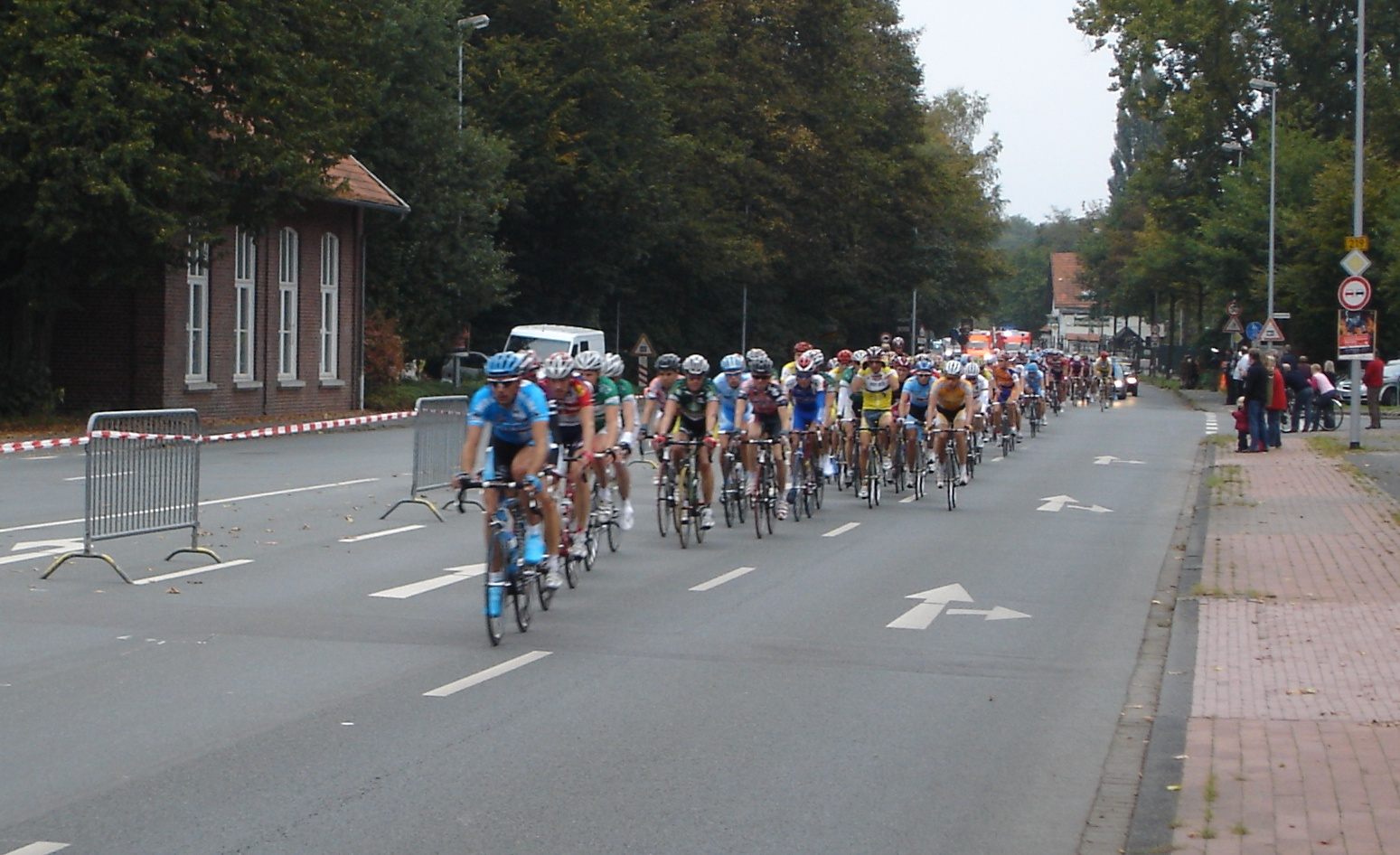 Das Hauptfeld des Münsterland GIRO 2007 in Münster-Kinderhaus